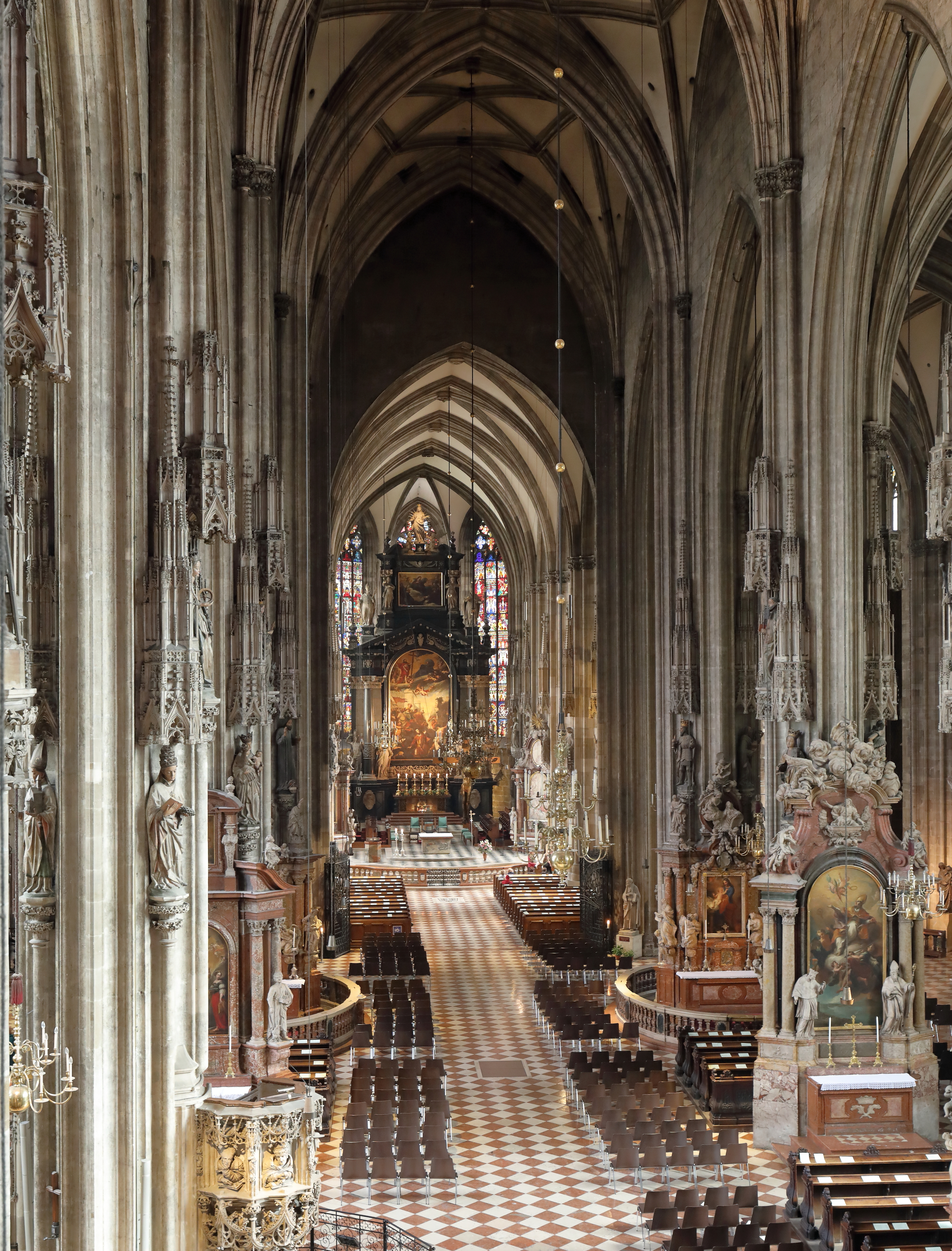 Blick von der Empore über das Mittelschiff zum Hochaltar im Stephansdom in der österreichischen Bundeshauptstadt Wien.Das gotische dreischiffige Langhaus wurde über einer Vorgängerkirche im 15. Jahrhundert errichtet. Der am 19. Mai 1647 geweihte Hochaltar des Doms ist ein frühbarockes Meisterwerk aus Marmor und Stein. Er wurde von dem Steinmetzmeister, Bildhauer und Architekten Johann Jacob Pock errichtet und sein Bruder, Tobias Pock, malte das Altarbild. Die Kanzel (links unten im Bild) ist ein Meisterwerk der spätgotischen Plastik aus Breitenbrunner Kalksandstein und wurde Anfang des 16. Jahrhunderts realisiert.